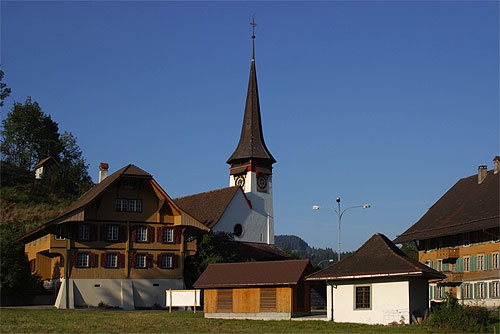 Röthenbach im Emmental, Schweiz, in der Abendsonne Kirche von Karl Indermühle; September 2004